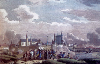 Bataille de Nantes 1793